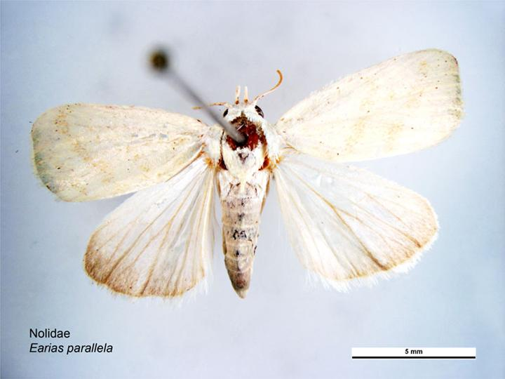 Earias parallela dorsal view